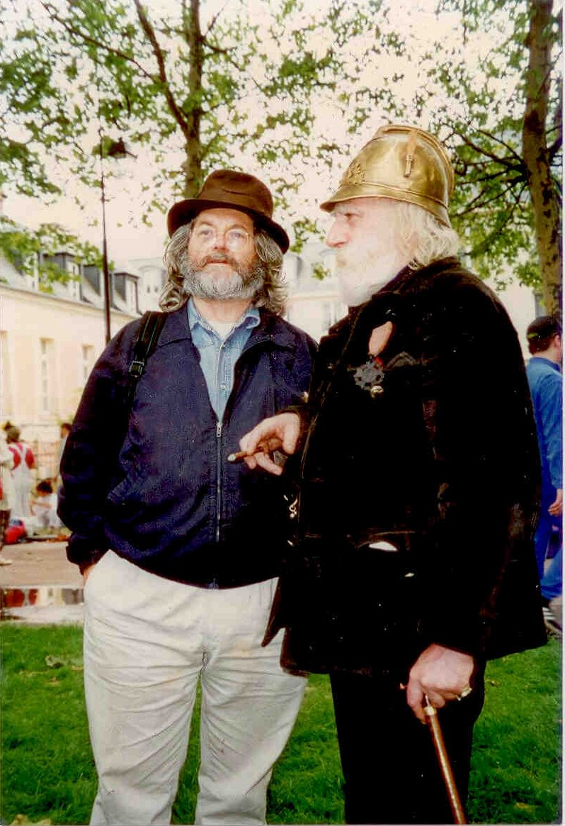 Marchand, professeur d'architecture aux Beaux-Arts de Paris et Jean-François Duffau, professeur de sculpture aux Beaux-Arts de Paris.